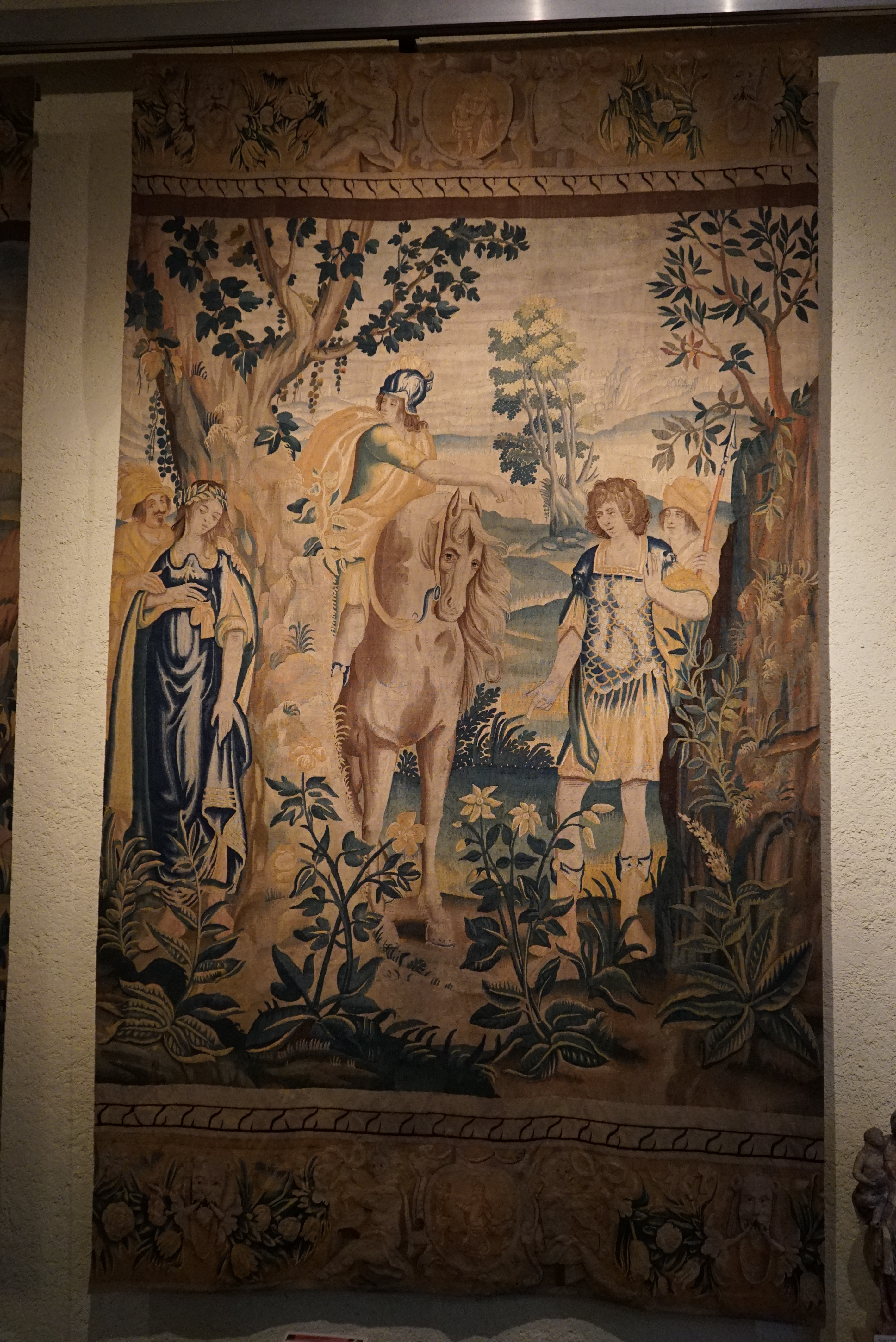 tapisseries du XVIe siècle.